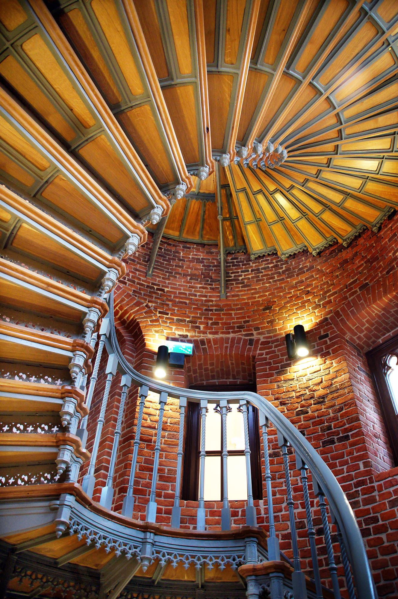 Wrocław, zespół Dworca Głównego